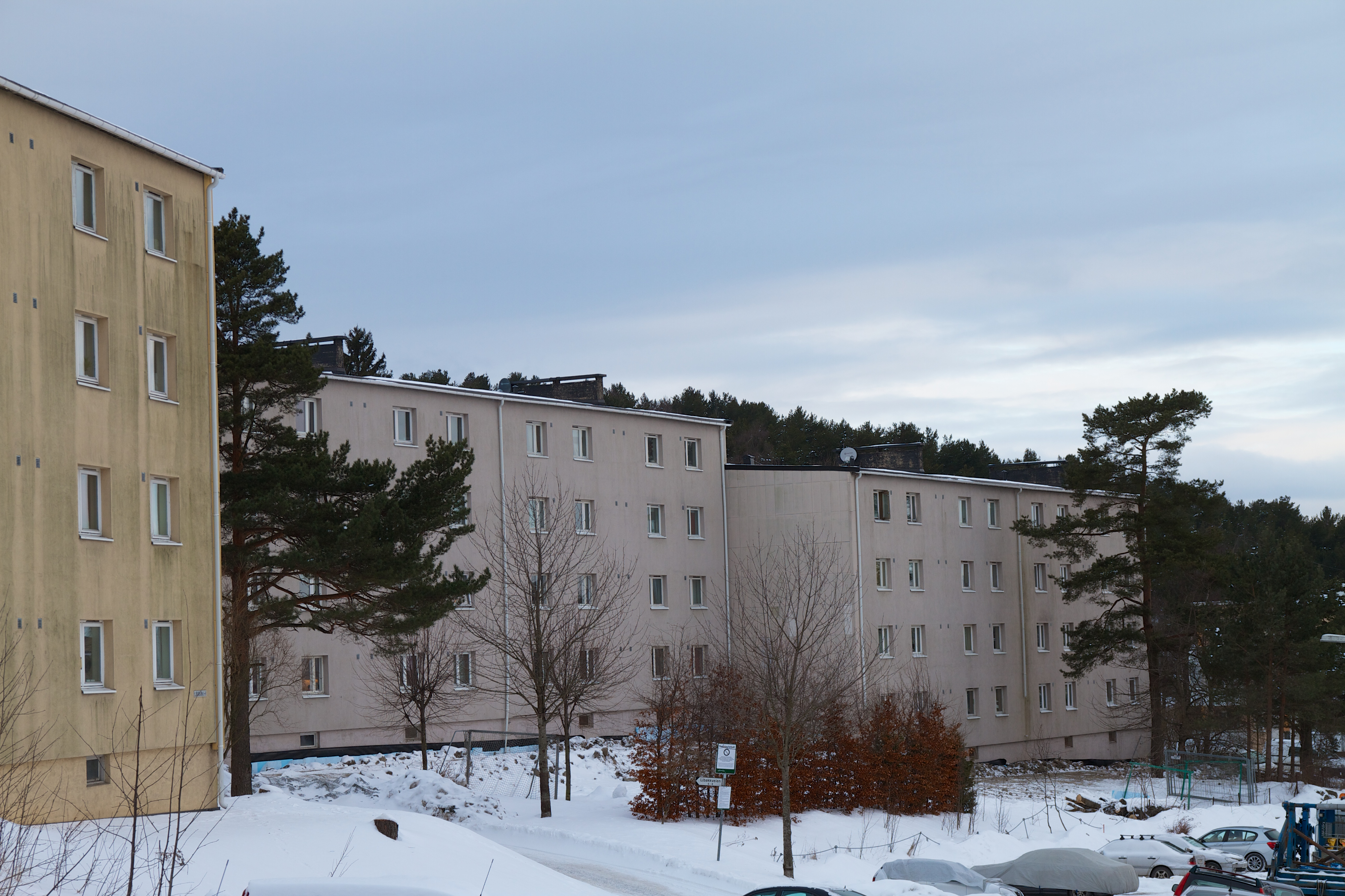 Fra Bratlikollen Boligsameie